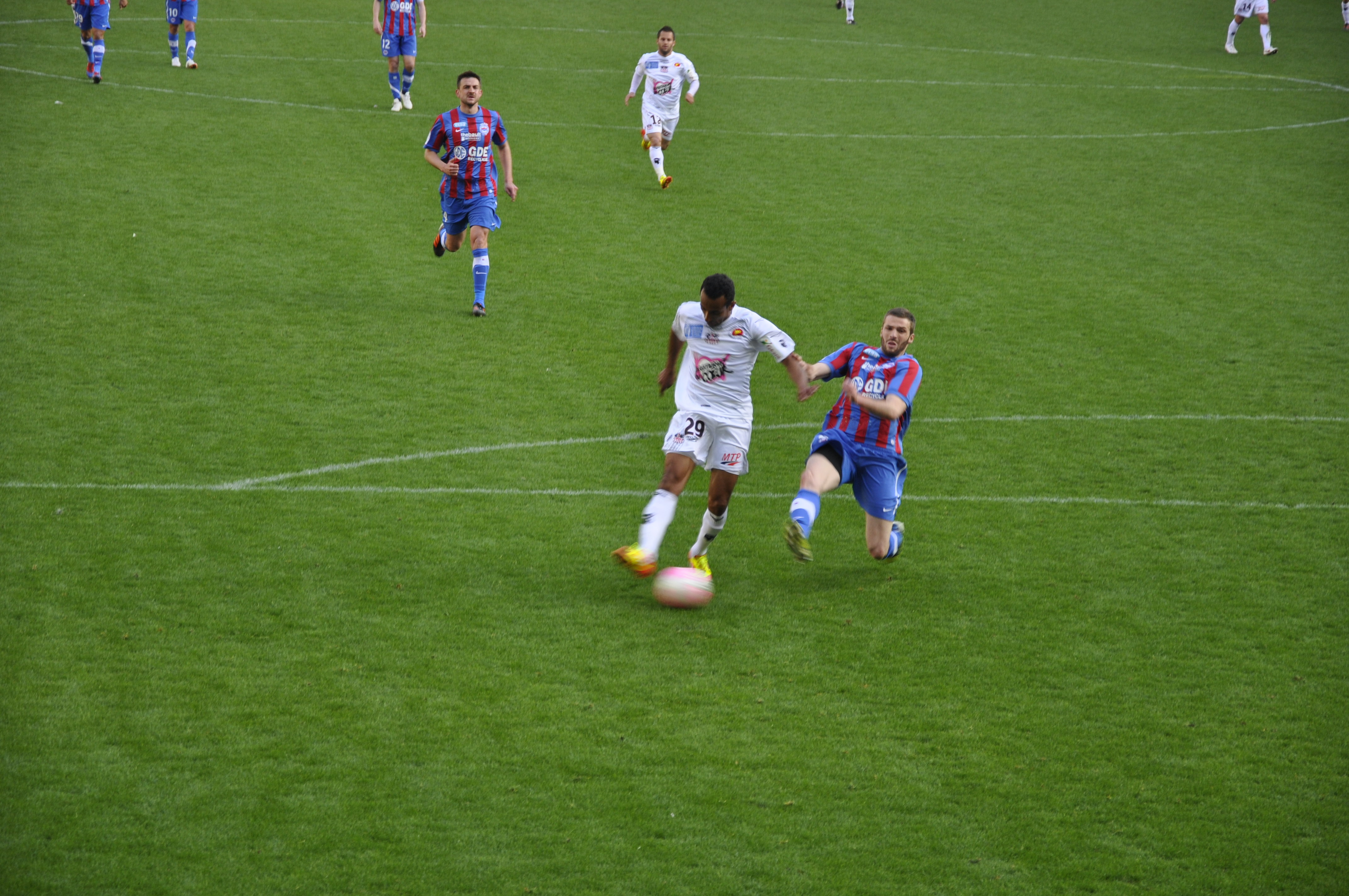 Thomas Heurtaux contrant in-extremis Eduardo lors du match entre le SM Caen et l'AC Ajaccio le 1er avril 2012